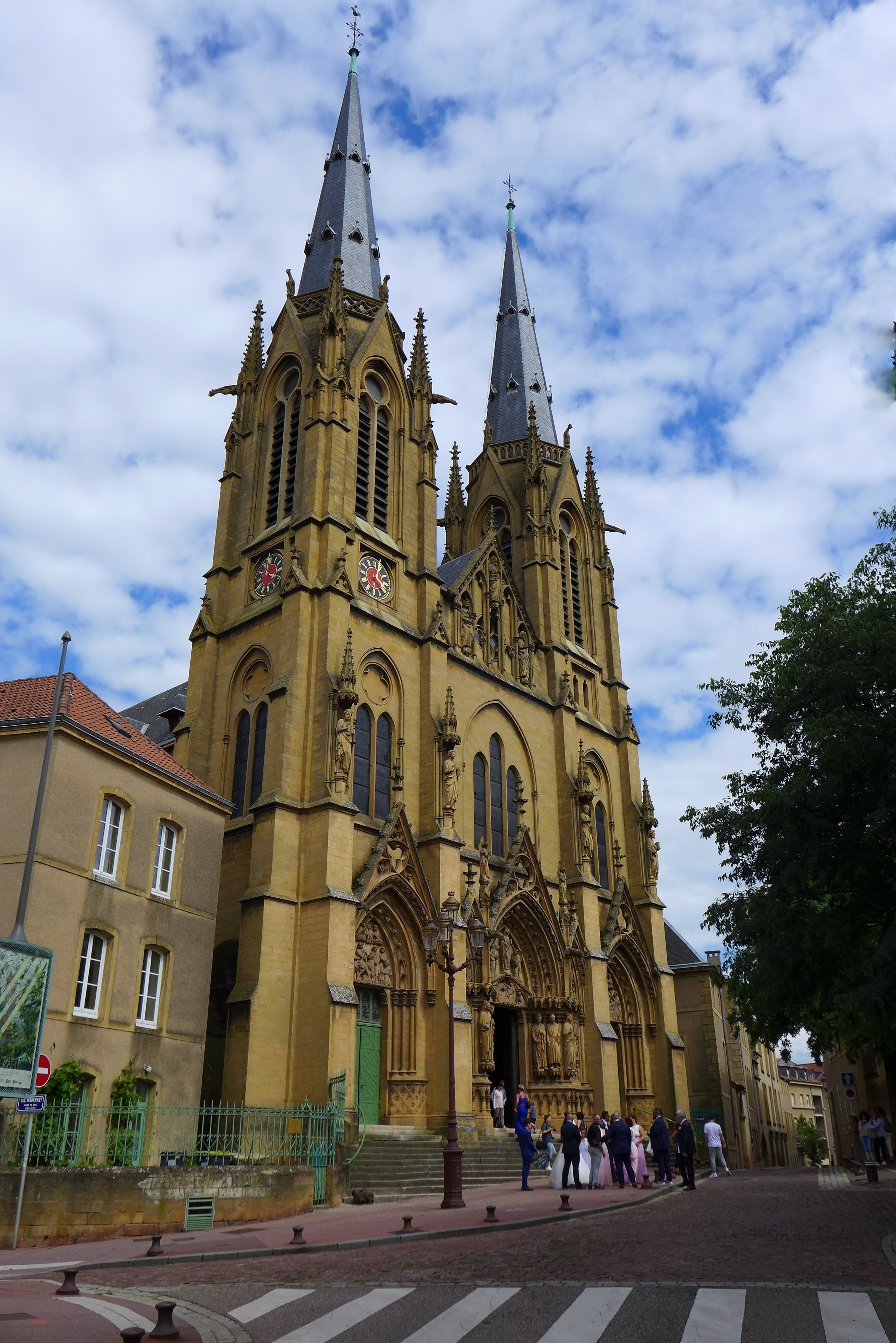 St. Segolenakirche (Metz), Turmfassade an der Place Jeanne d´Arc